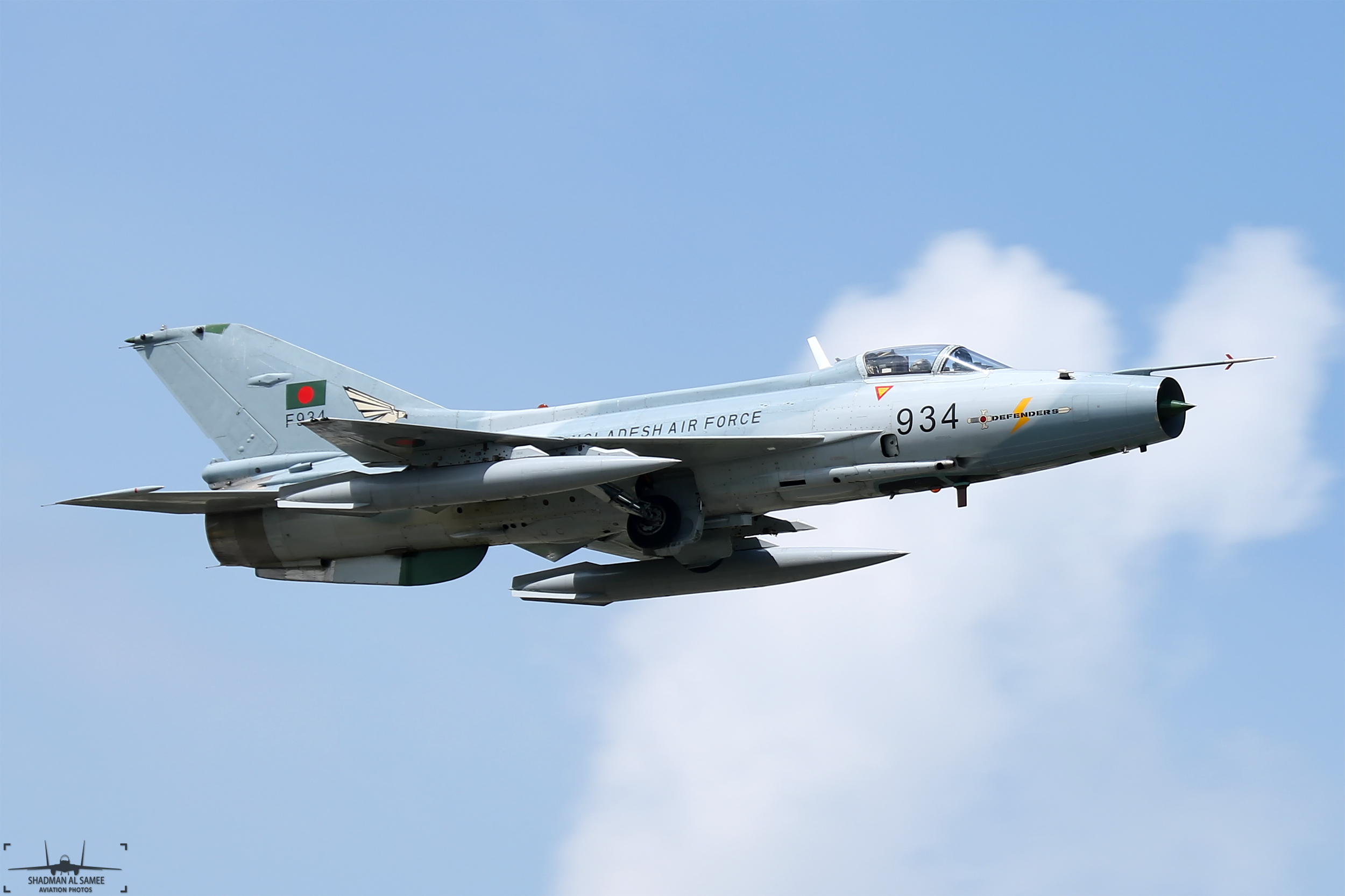 VGHS 2018.